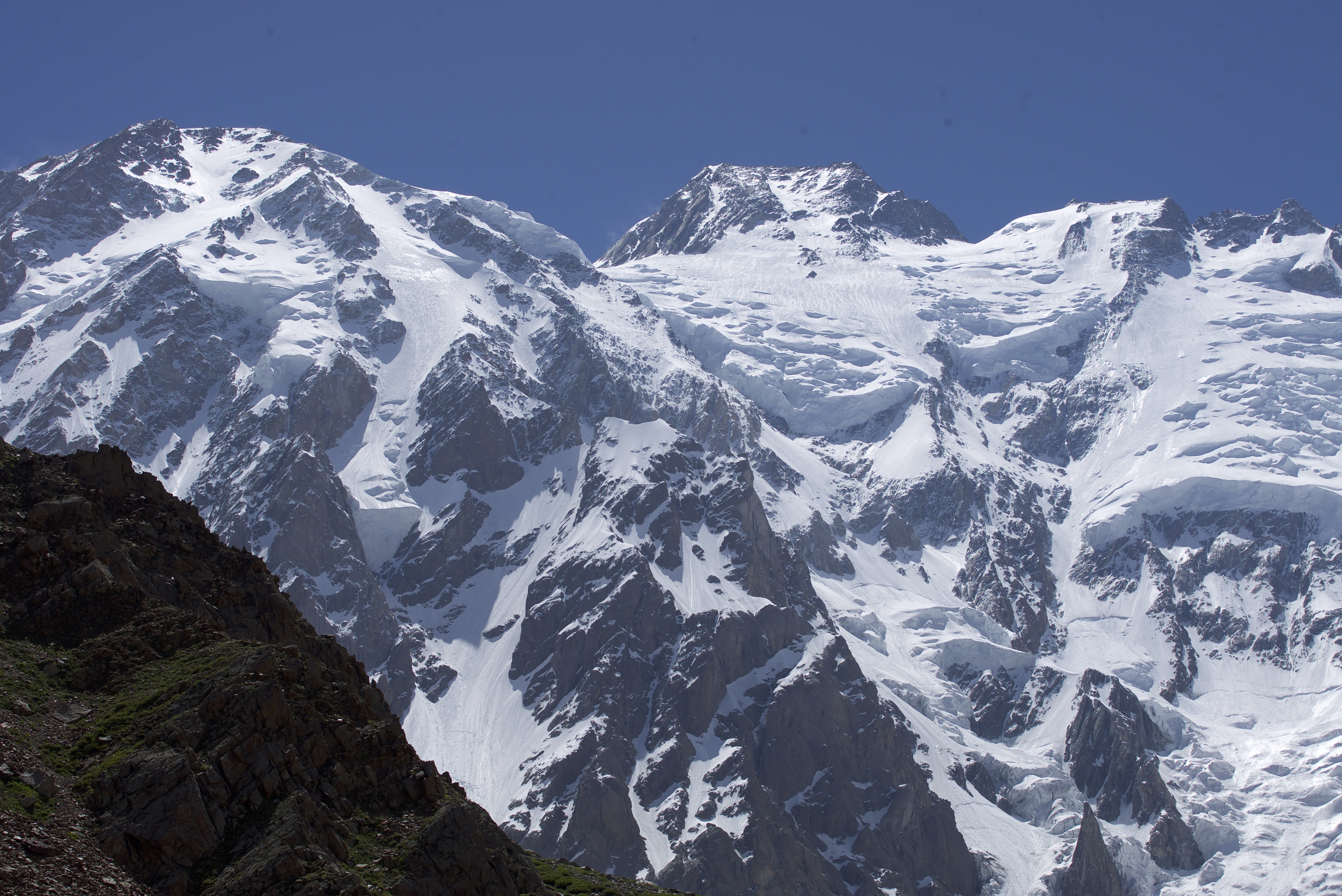 Nanga Parbat - Diamirská stěna. Foceno ze základního tábora české expedice v červenci 2018. Vrchol je uprostřed. Zhruba v první třetině fotografie zleva je vidět část Kinshoferovy cesty.